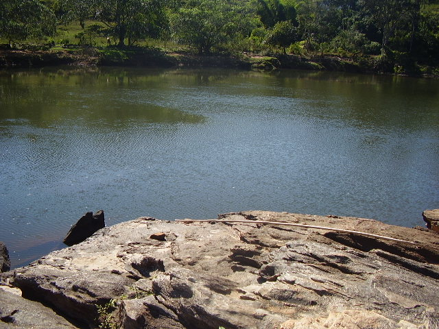 Esse é o poço do limão, lago localizado no município de Santo Antônio do Rio Abaixo.